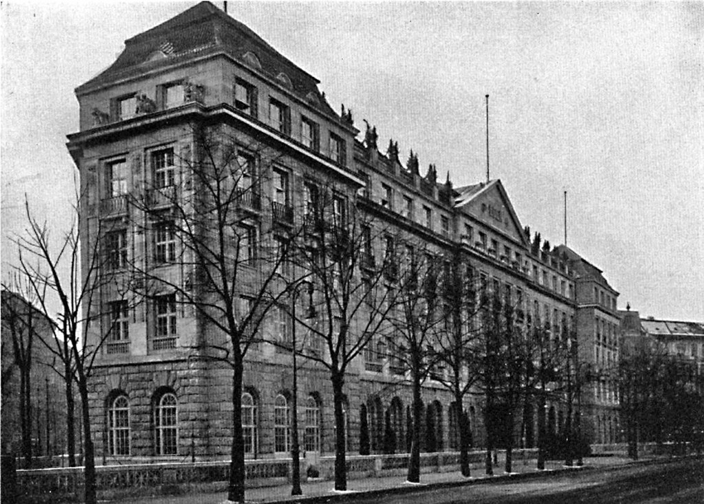 Eden-Hotel am Kurfürstendamm 243-247, Ansicht Februar 1914; ab Straßenumbenennung 1925 lautete die Adresse neu: Budapester Straße 35